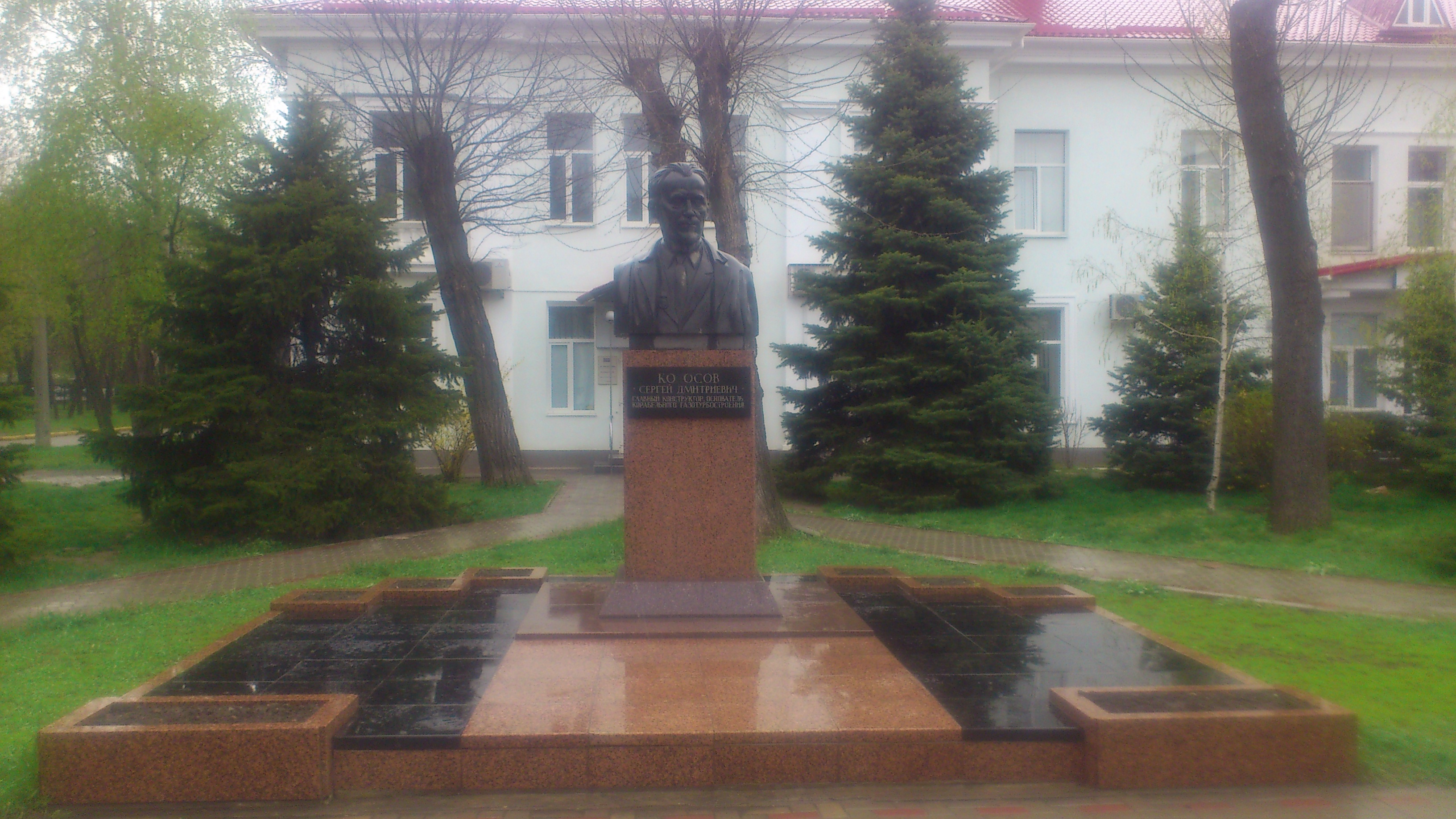 Пам'ятник Сергію Колосову біля центральної прохідної заводу "Зоря-Машпроект"